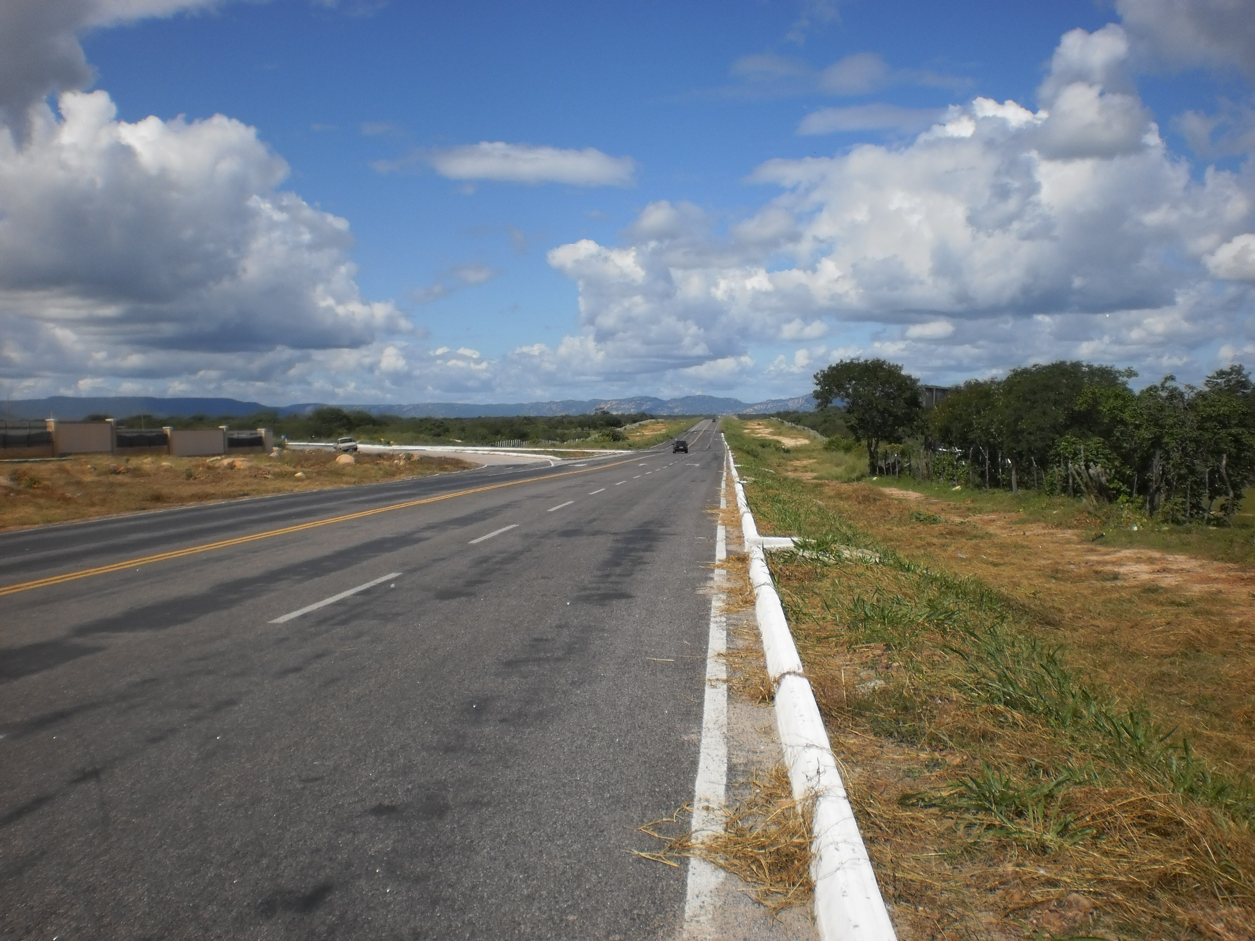 Rodovia federal BR-226 próximo ao câmpus da UFERSA, saída para Antônio Martins. Ao lado, a RN-177, em direção a Francisco Dantas - Rio Grande do Norte, Brasil.